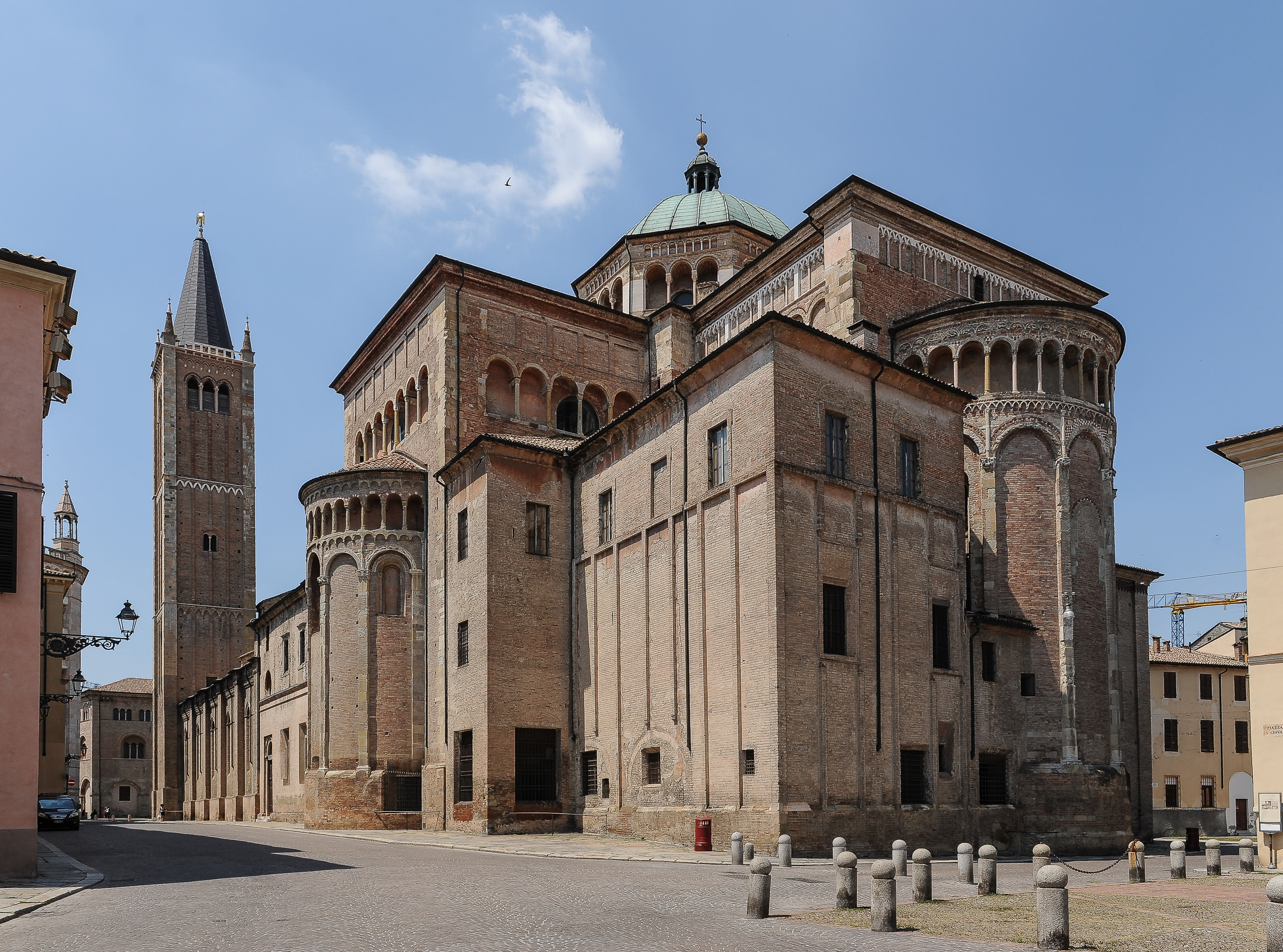 Cattedrale di Parma, Parma, Italy